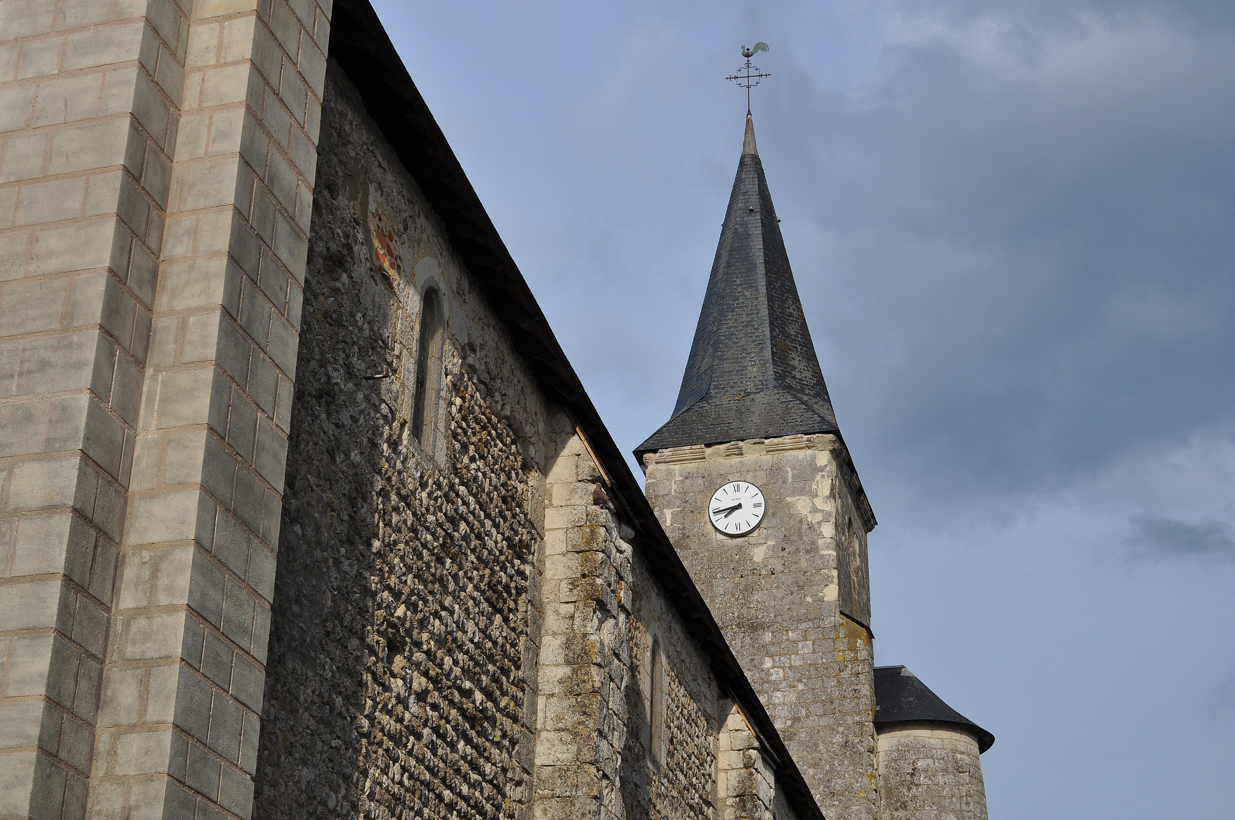 Eglise Saint Martin de Genneteil (Maine-et-Loire) .